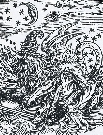 Salamander pictured in Paracelsus: "Auslegung von 30 magischen Figuren", Strasbourg. 1616 A.D.